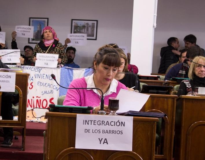 Fernanda Miño en el Concejo Deliberante de San Isidro